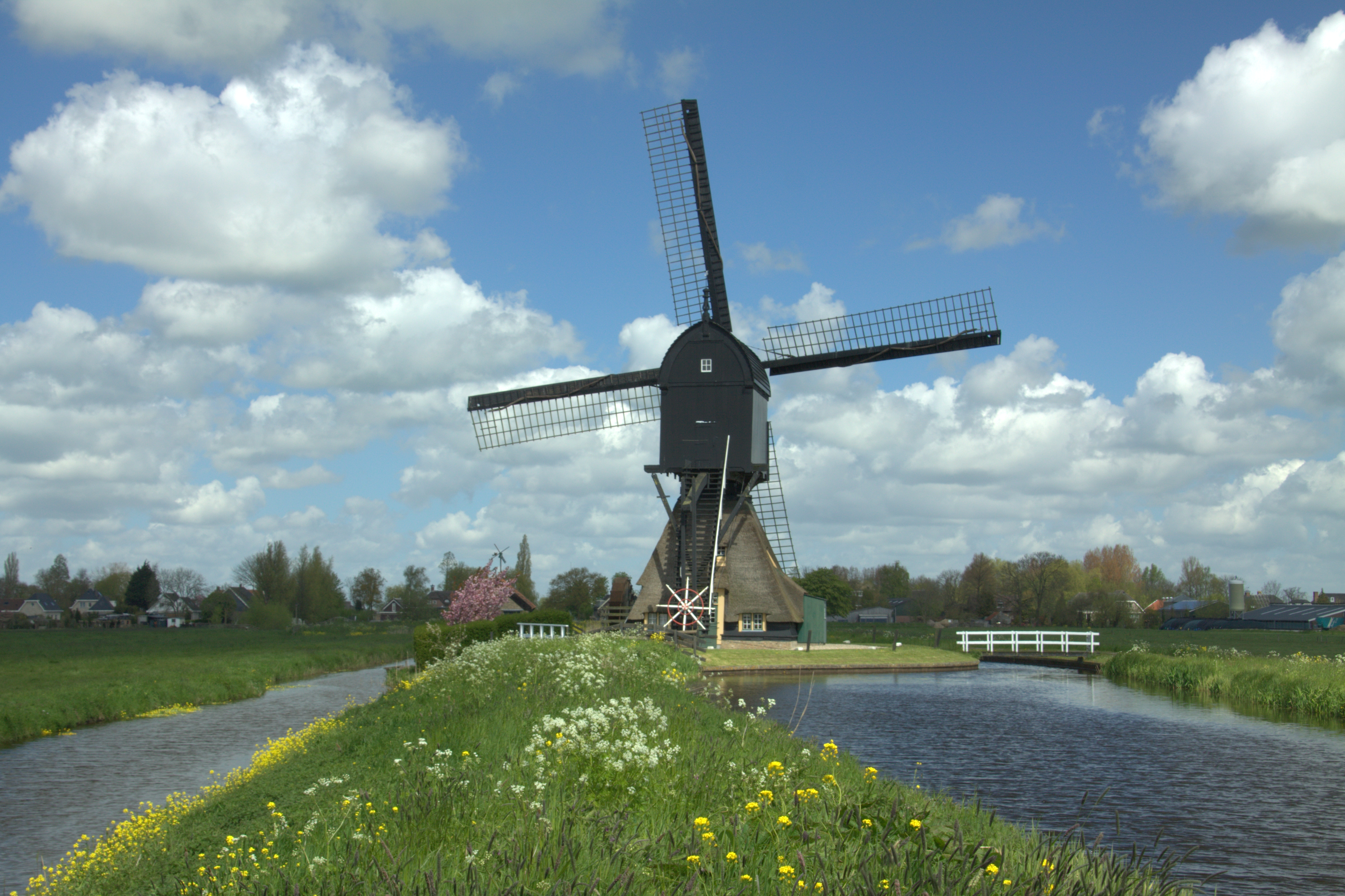 Midden in het uitgestrekte landschap van de Alblasserwaard staat bij Molenaarsgraaf de Middenmolen te pronken.